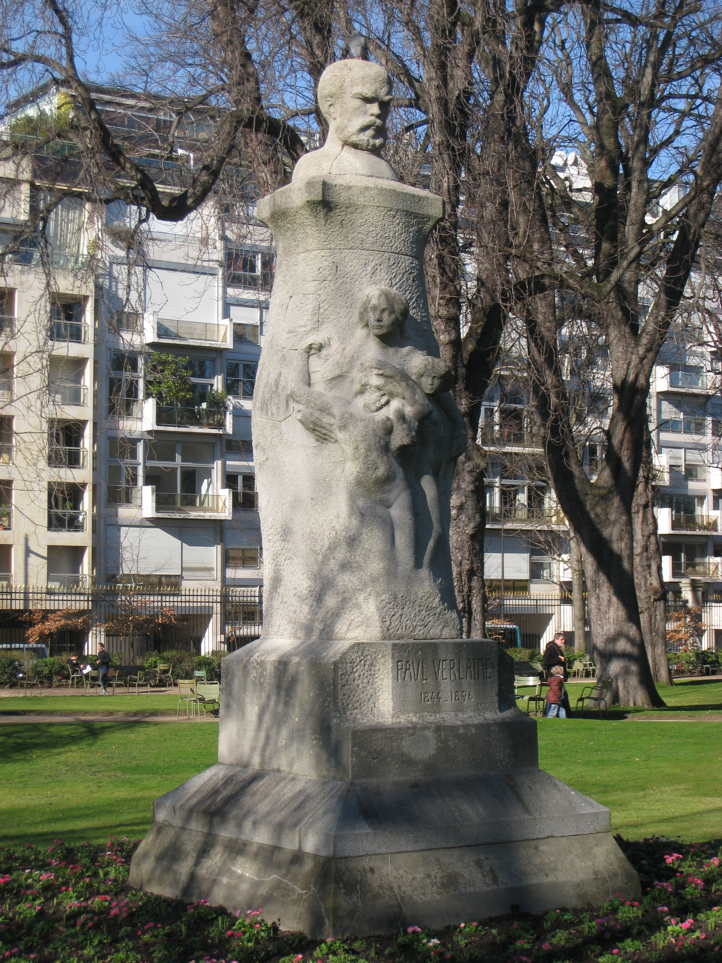 Auguste de Niederhausern (Suisse, 1863-1913), dit Rodo de Niederhausern: Portrait en buste de Paul Verlaine (inauguré en 1911, études dès 1889) [1], pierre, Paris, Jardin du Luxembourg. Copyright restrictions (if any) have long since expired as the sculptor died more than 70 years ago.